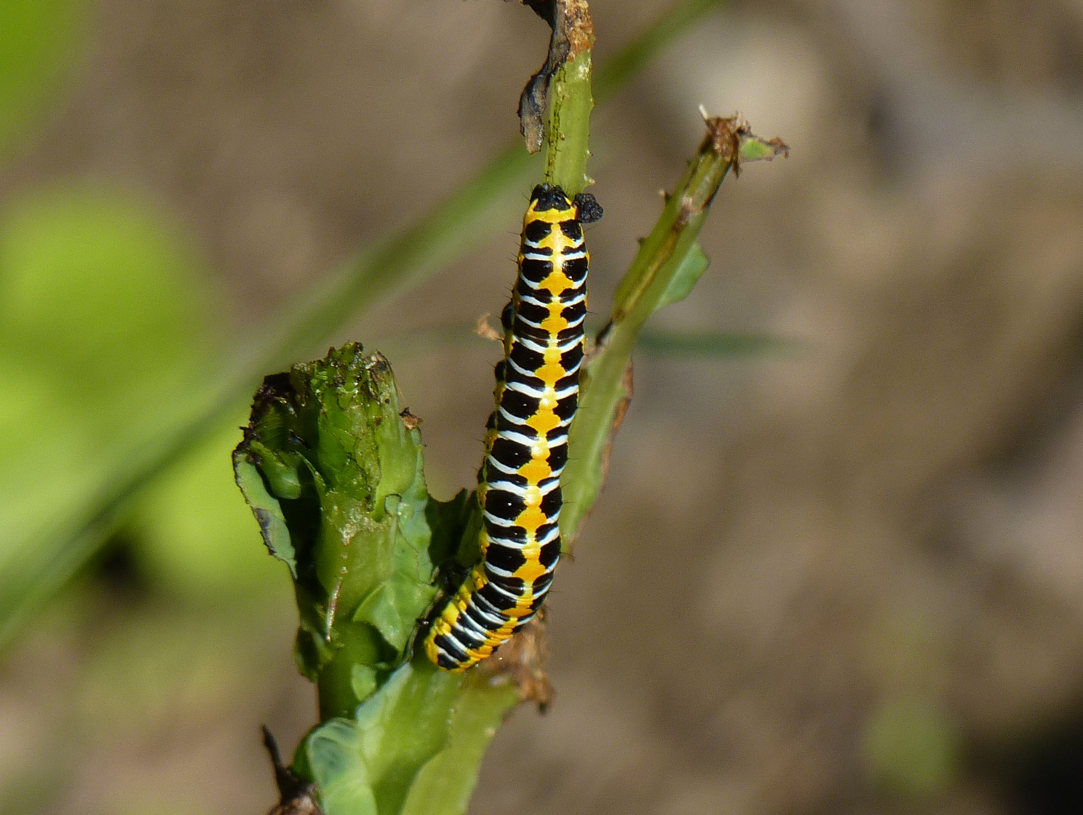 Lattich-Mönch (Cucullia lactucae)